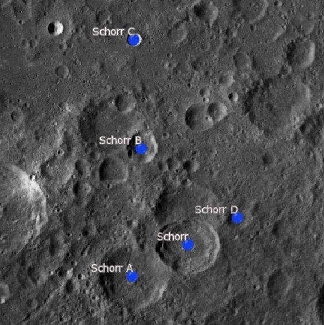 Cráter lunar Schorr. Cráteres satélite. (Imagen LRO)